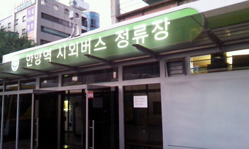 안양역시외버스터미널의 모습